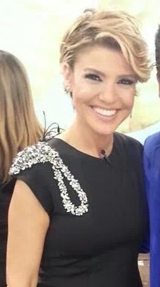 GÜLBEN ERGEN SHOW DA. ..